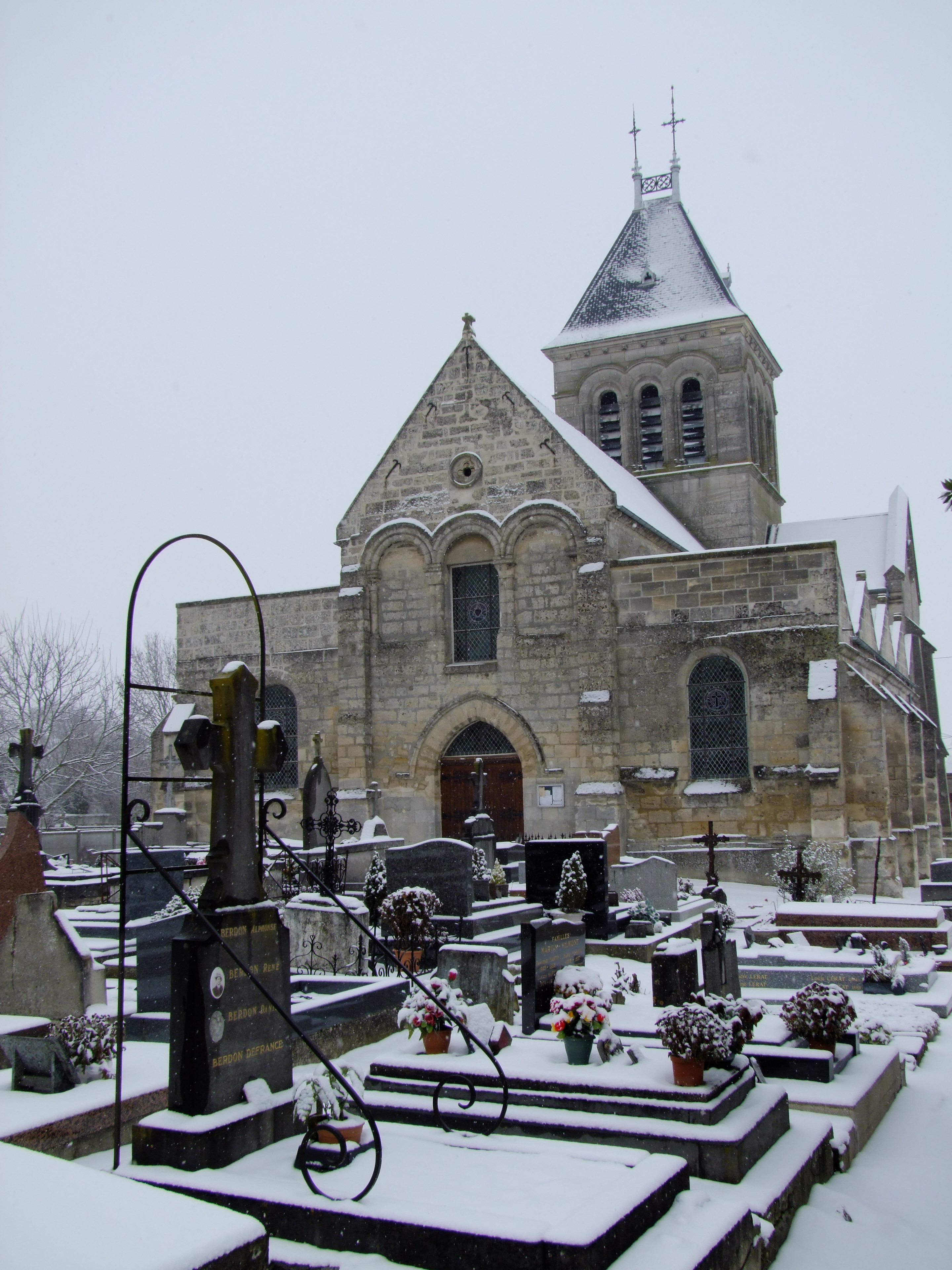 Eglise de Lagny (Oise) sous la neige